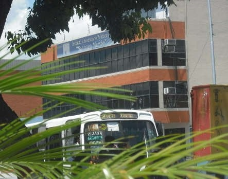 Sede del IUPSM en Puerto Ordaz